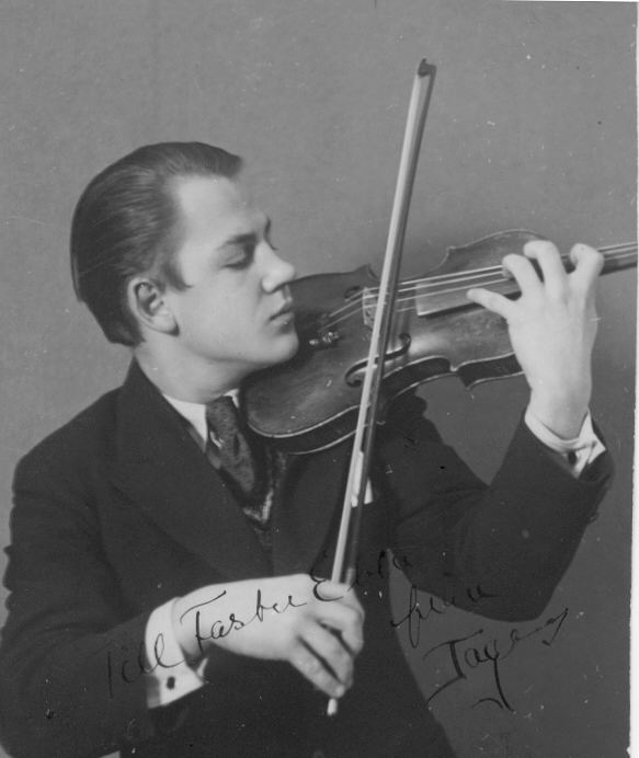 Tage Ringheim